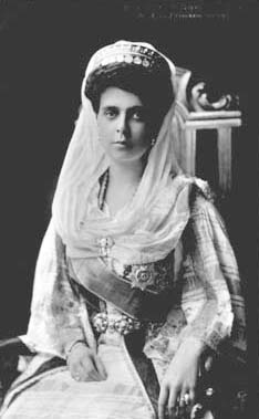 Elena Vladimirovna of Russia